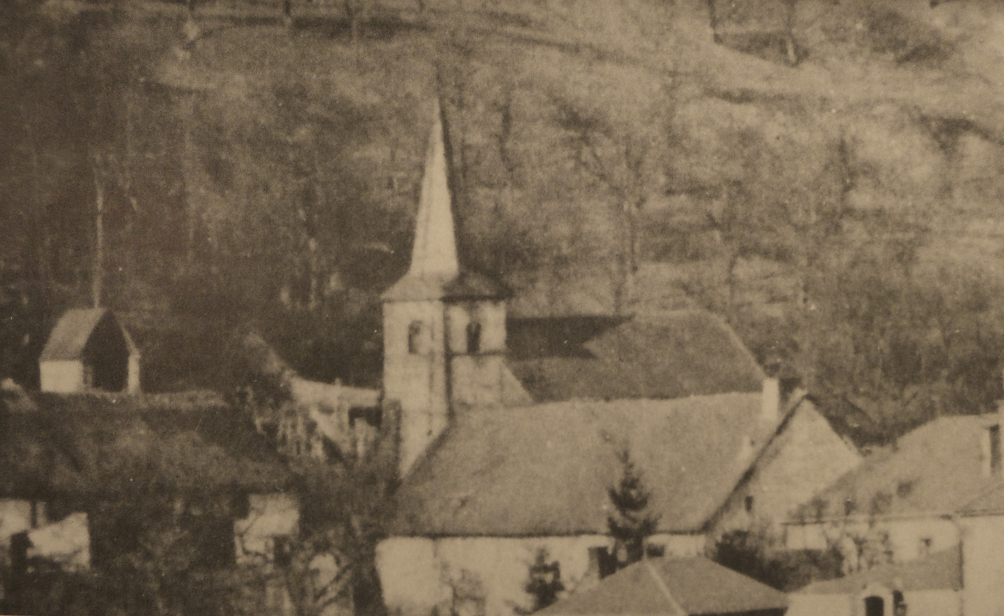 Beckingen, spätgotische Pfarrkirche, links die Leidingersche Grabkapelle, Foto von 1873/74 (Pfarrarchiv Beckingen)